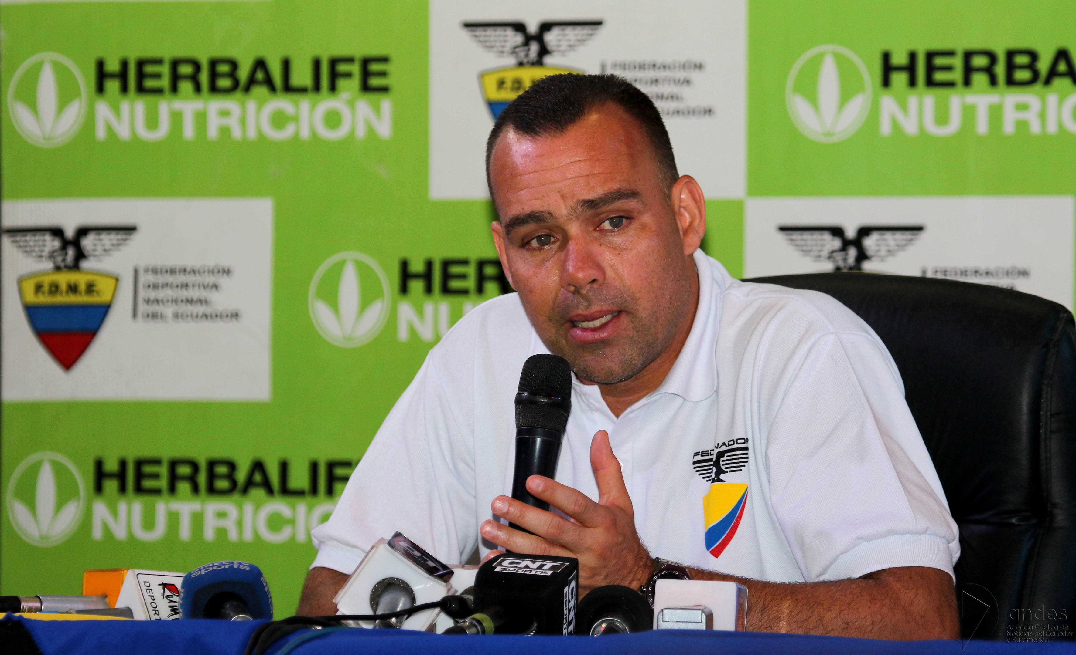 Guayaquil, jueves 27 de julio del 2017 (Andes).-El ex portero venezolano Rafael Dudamel es el invitado especial del torneo formativo de fútbol de Fedenador. Foto:Andes/César Muñoz